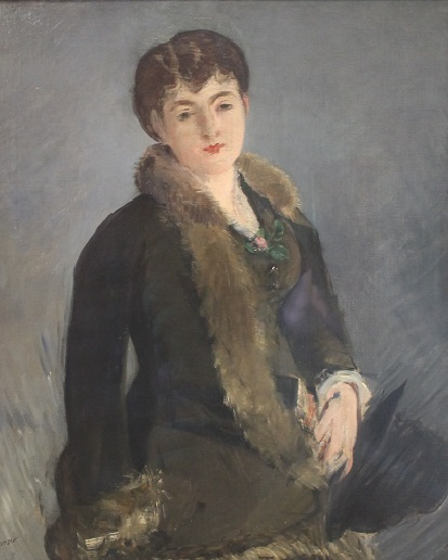 Retrato de la señorita Isabelle Lemonnier, por Édouard Manet, ca. 1879-80, óleo sobre lienzo, 101.8 x 81.5 cm, Museo del Hermitage, San Petersburgo.